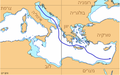 אוניית המעפילים אורד וינגייט - מסלול